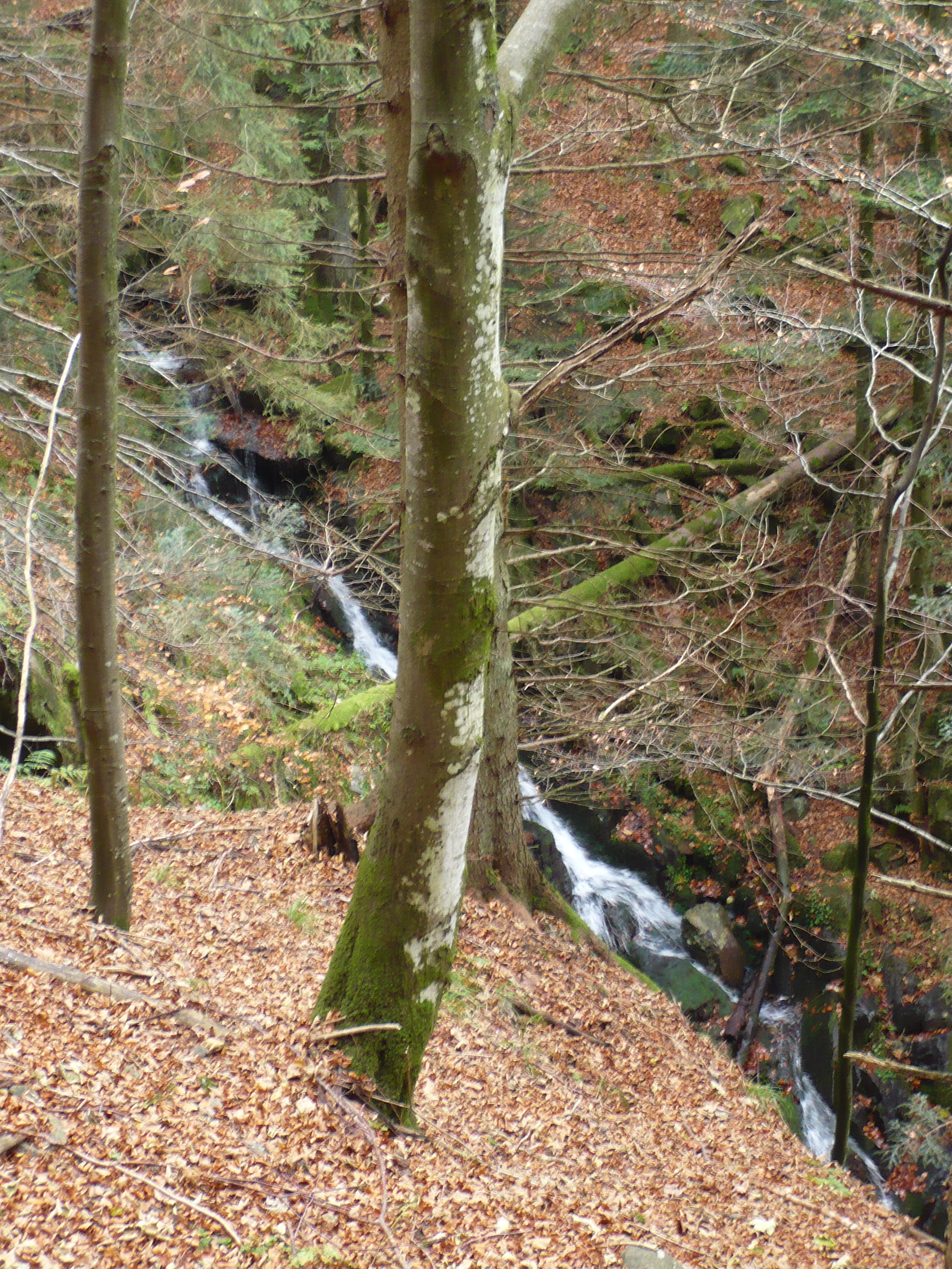 Hirschbachfälle